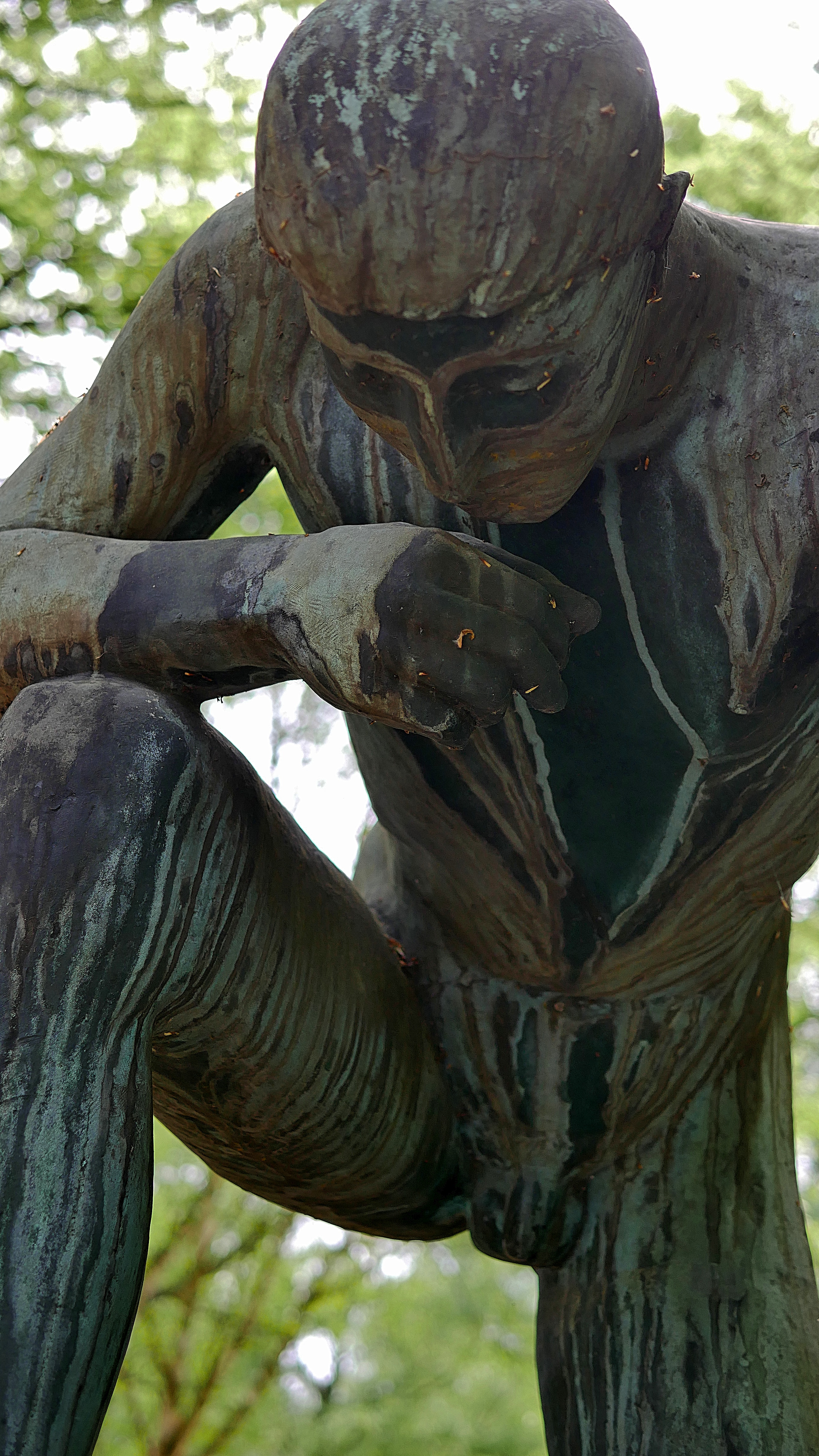 Denkmal für die Opfer der Gewaltherrschaft, 1950 geschaffen vom Trierer Bildhauer Michael Trierweiler. Hauptfriedhof Trier (in der Nähe des jüdischen Friedhofs und der neuen Aussegnungshalle)